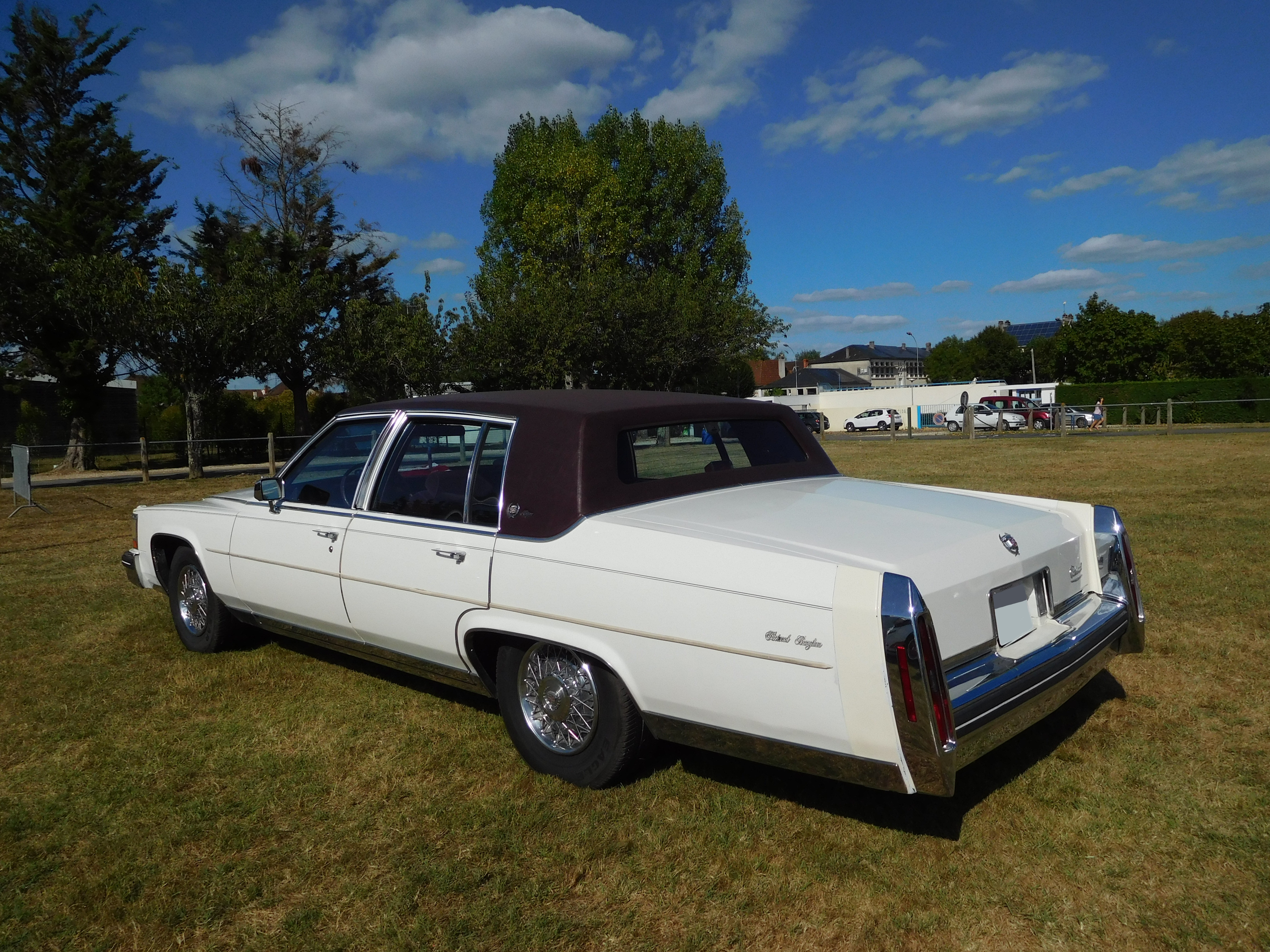 Cadillac Fleetwood Brougham de 1984.